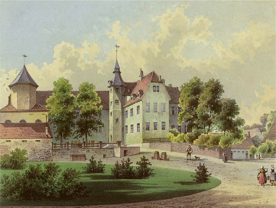 Abbildung des Rittergutes Gerbstedt in Gerbstedt an der Saale (Sachsen-Anhalt). Es ist einer der Stammsitze des Adelsgeschlechts von Steuben